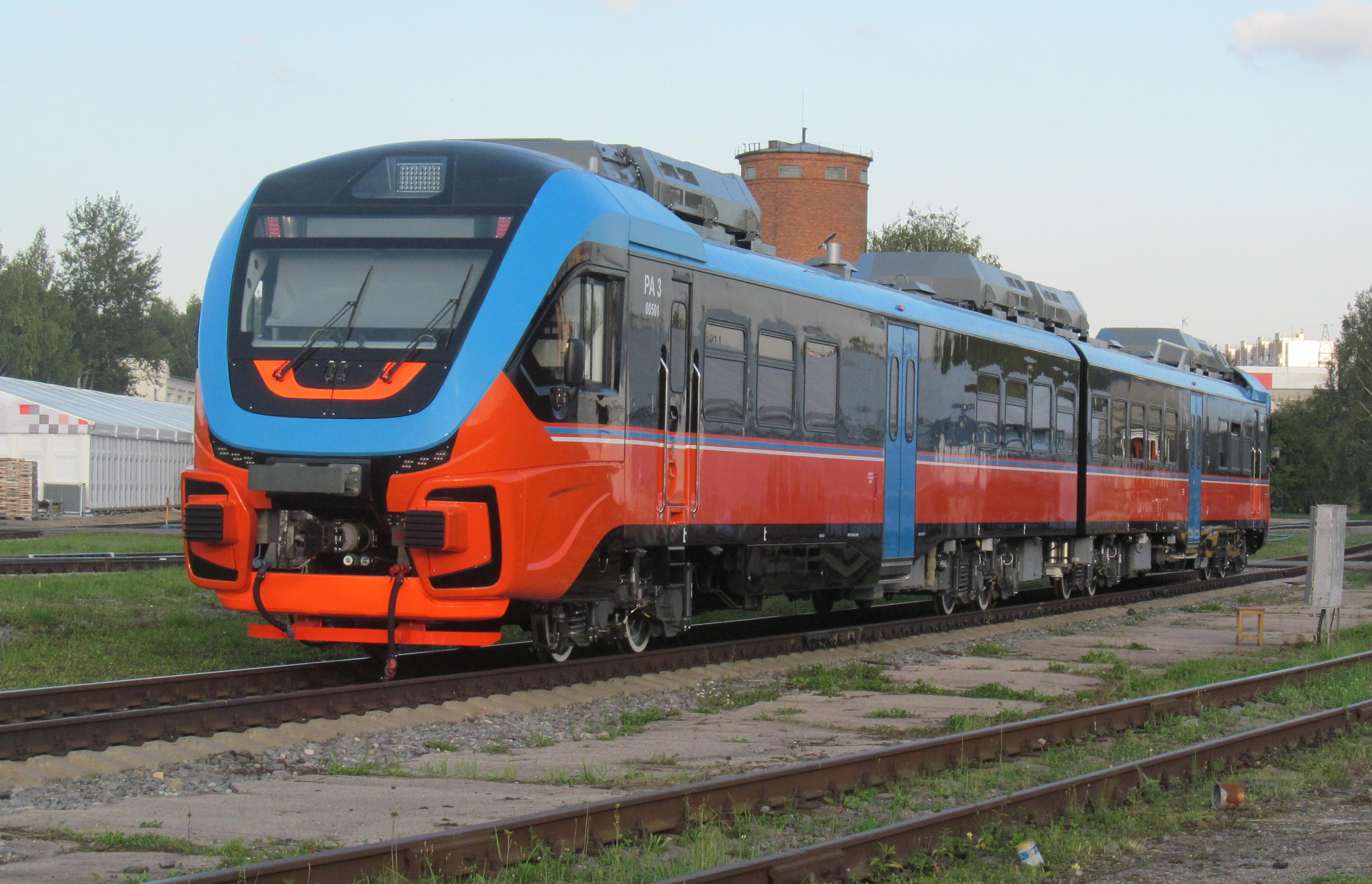 Дизель-поезд РА3-005 на выставке "PRO//Движение.Экспо" (ЭК ВНИИЖТ)